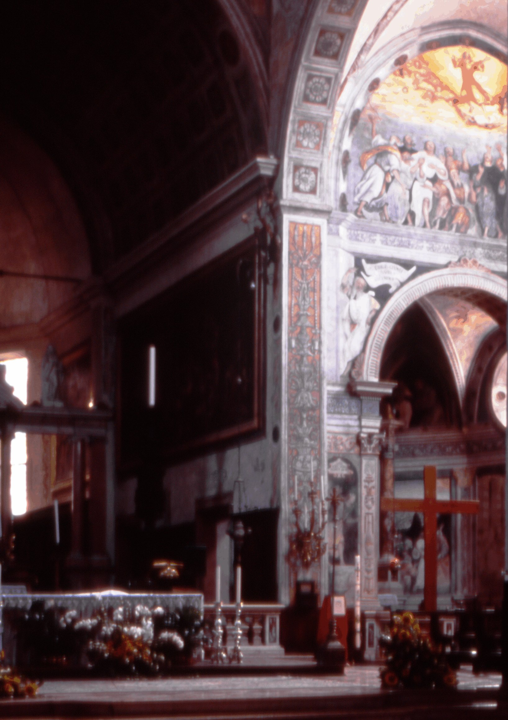 Santa Maria in Organo, Verona. Interior.